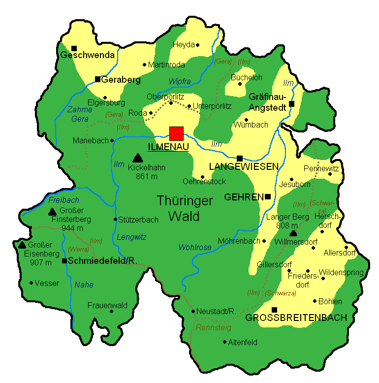 Karte des ehemaligen Kreises Ilmenau (Thüringen)